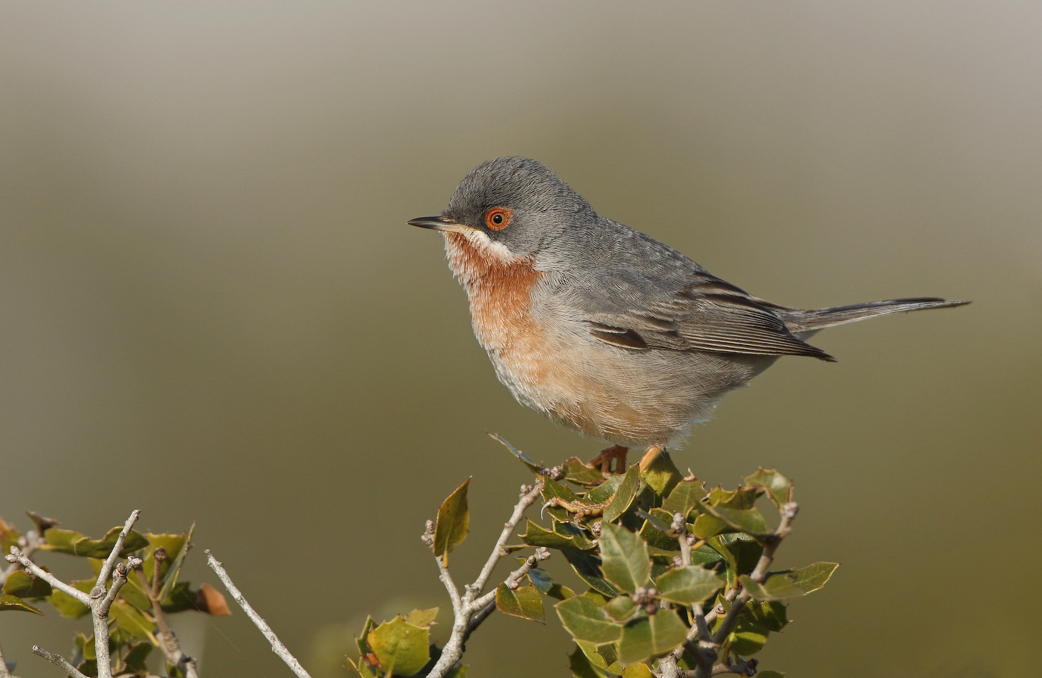 Κοκκινοτριροβάκος στον Υμηττό This is a photography of Natura 2000 protected area with ID GR3000006